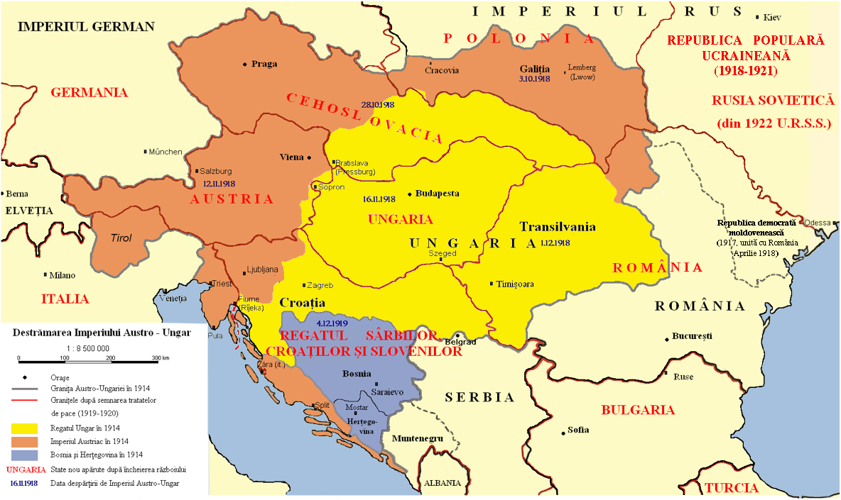 Desträmarea Austro-Ungariei, în româneste, pe un fond cartografic derivat dupä utilizatorul AlphaCentauri